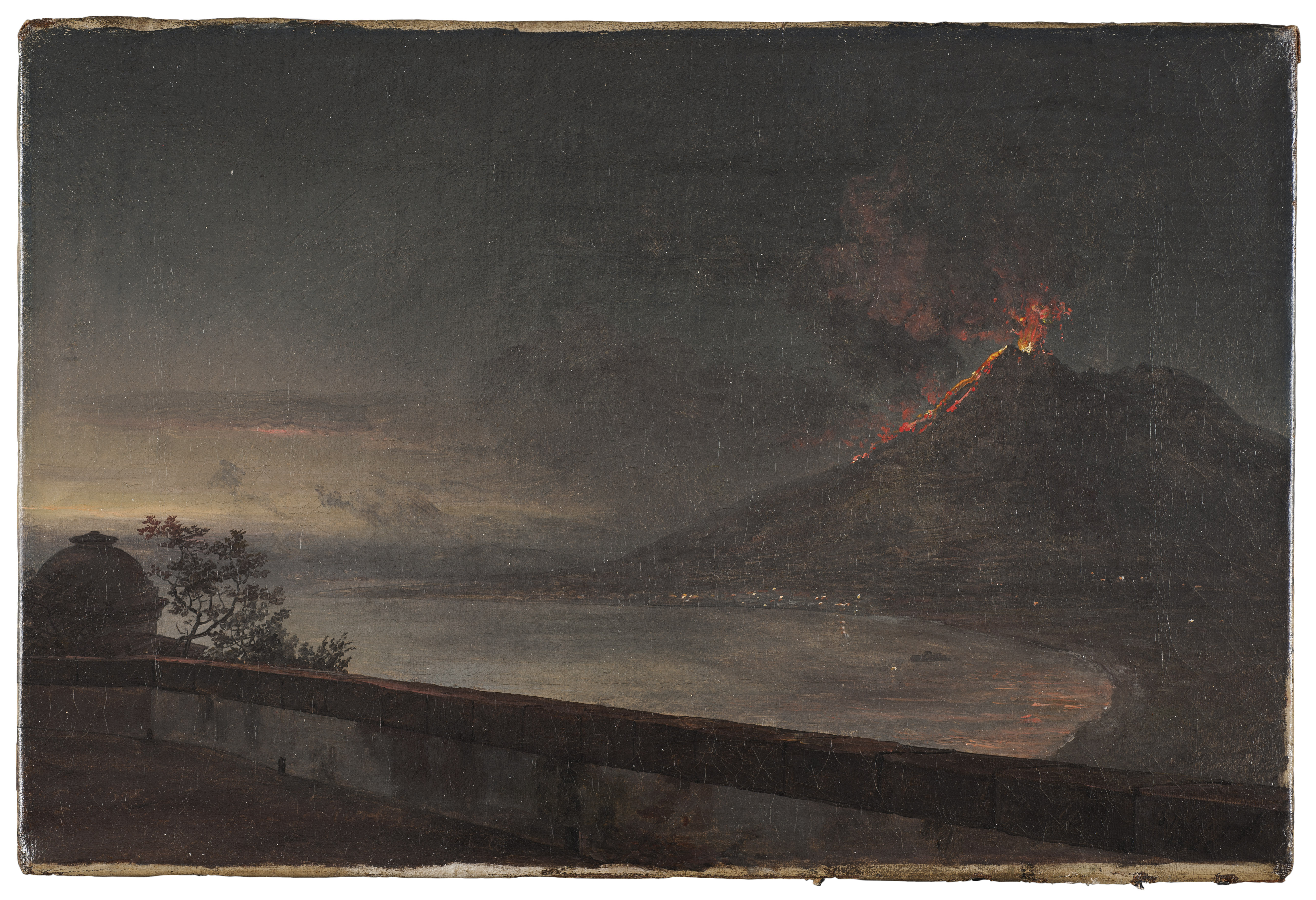 Johan Christian Dahl, Utsikt mot Vesuvuis från Quisisana, 1820, Nationalmuseum, Stockholm, NM 7287